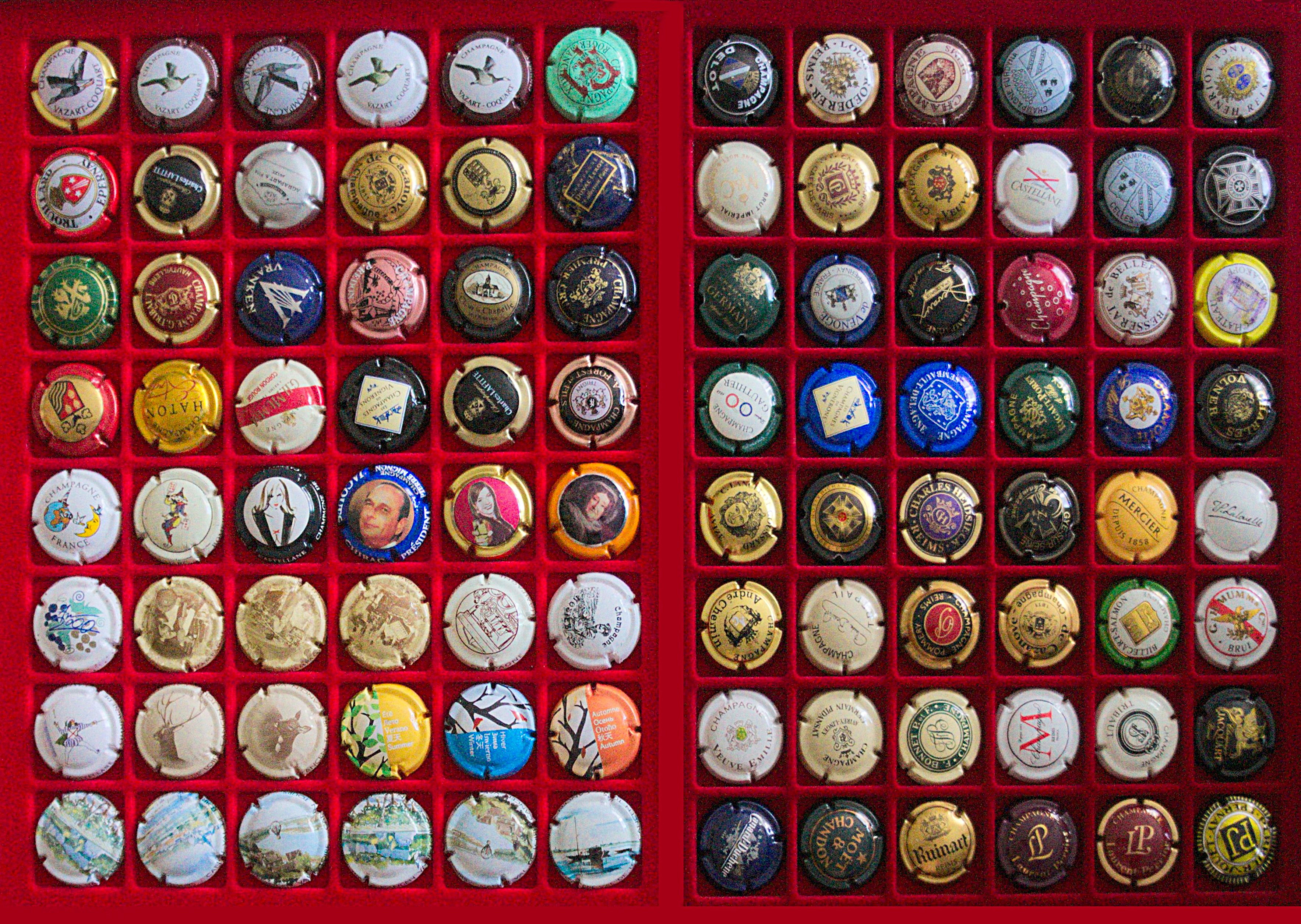 Plaques de muselets de bouteilles de champagne.